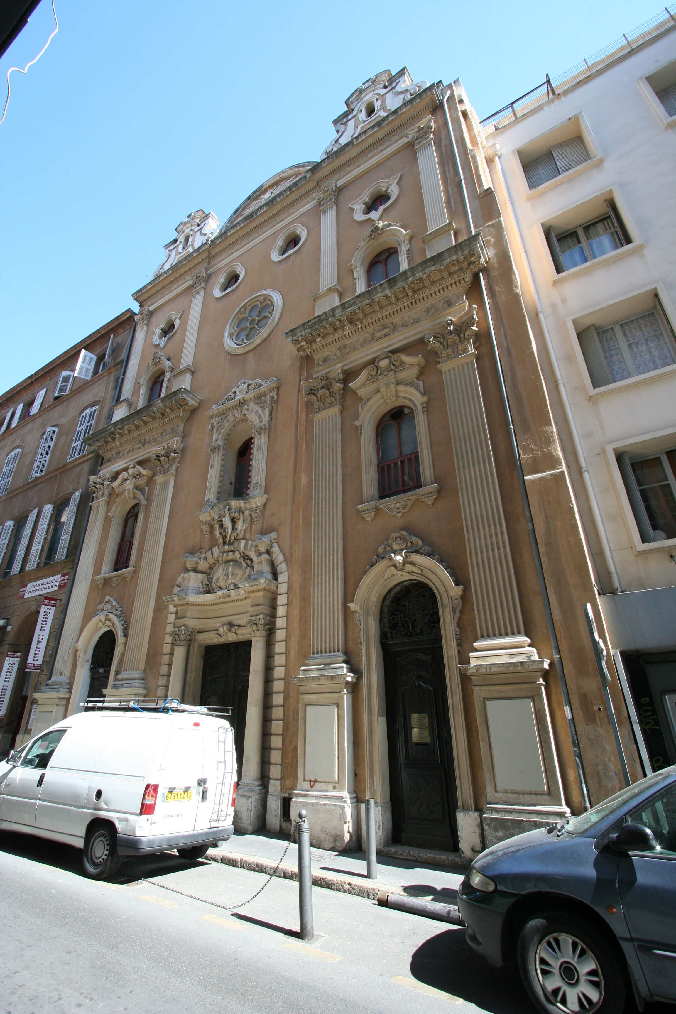 Marseille, église de la mission de France située rue du Tapis vert.